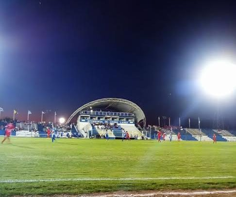 Estadio Arquitecto Antonio Eleuterio Ubilla, Melo , Cerro Largo, Uruguay.